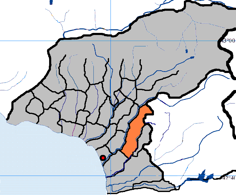 село Пакуаш в Очамчирском районе Абхазии